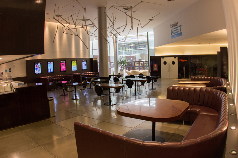 Detalhe do foyer do Estação NET Gávea